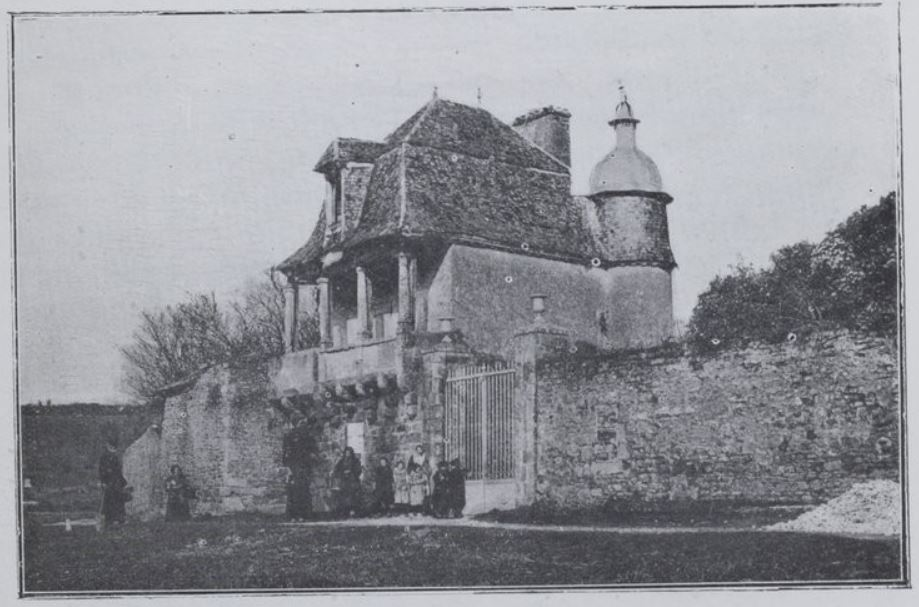 Porterie de l'Abbaye de la Joie, en bordure du Blavet, Hennebont